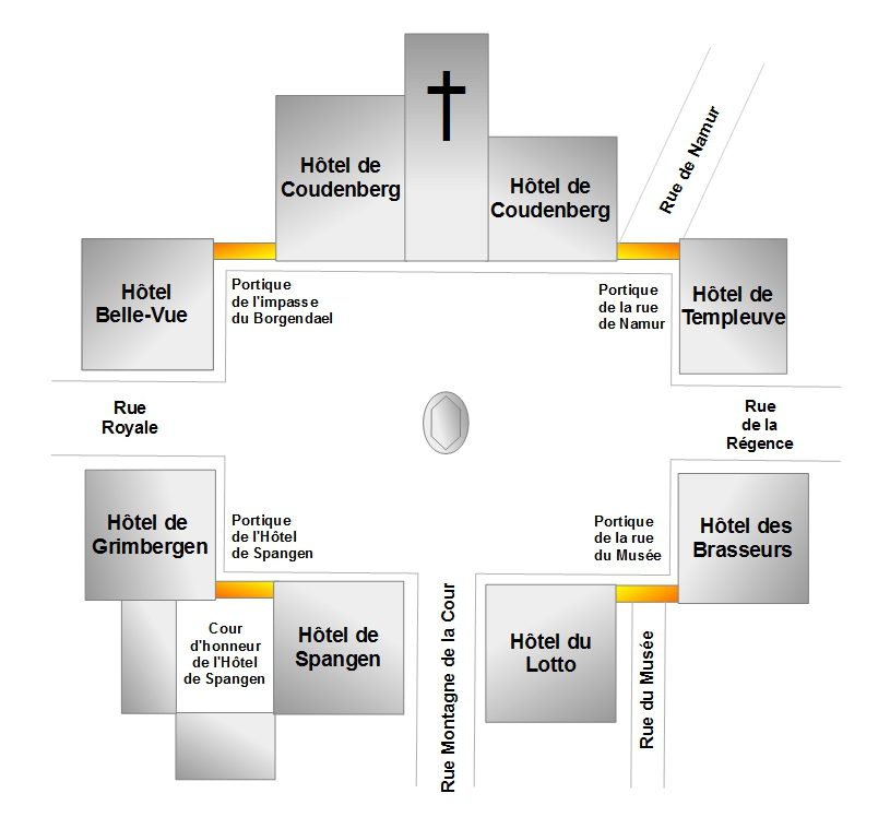 Belgique - Bruxelles - Plan de la place Royale - Portiques